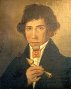 Gemälde Alois Hörbiger